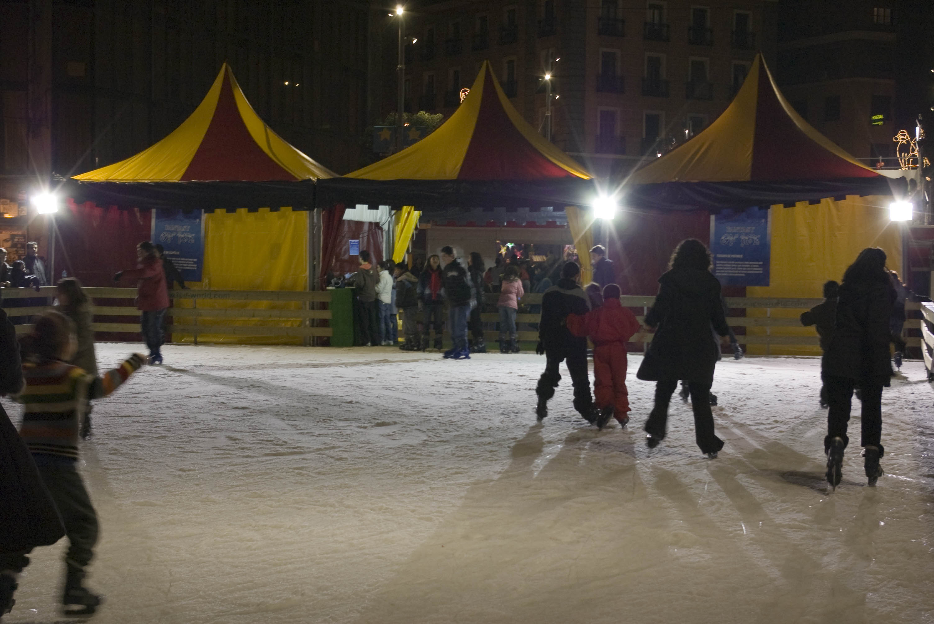 Pista de patinaje sobre hielo en la plaza de la Luna (Madrid)